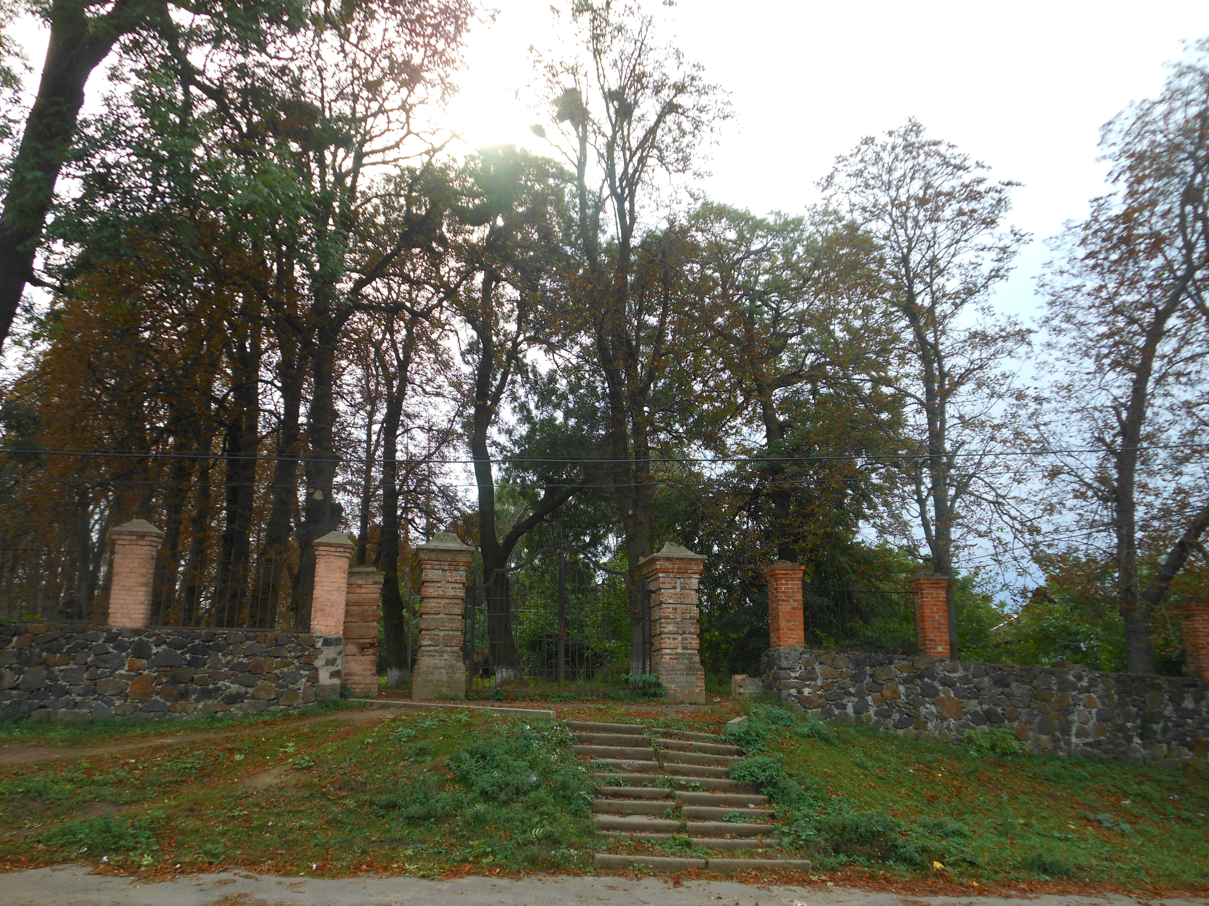 Ворота, Чернятин